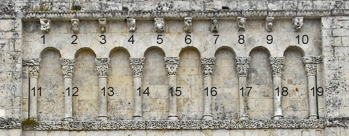 Notre-Dame Corme-Écluse,Fassade OG, Nummerierung